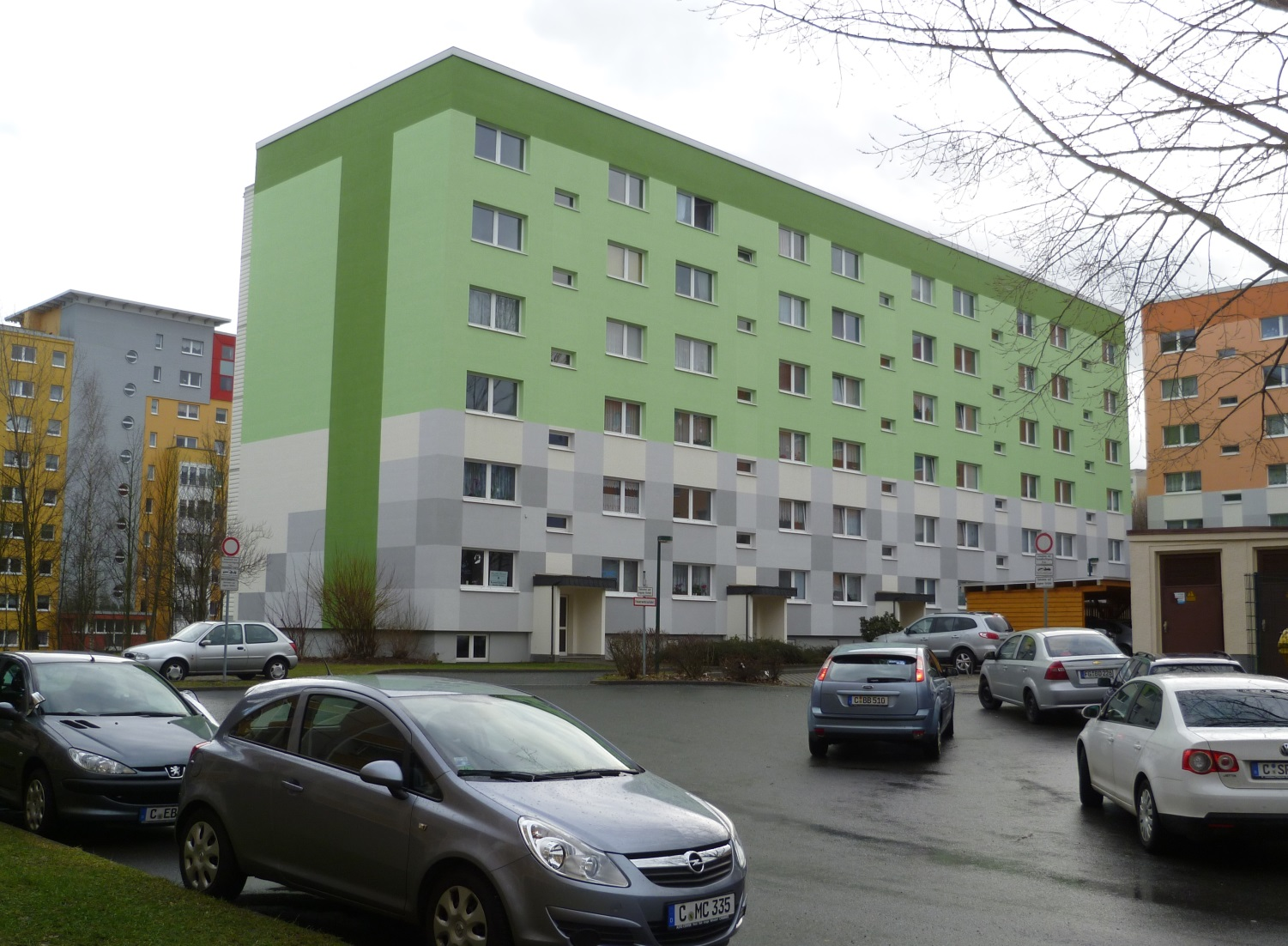 Sanierter Wohnblock im Fritz Heckert Gebiet, 2013